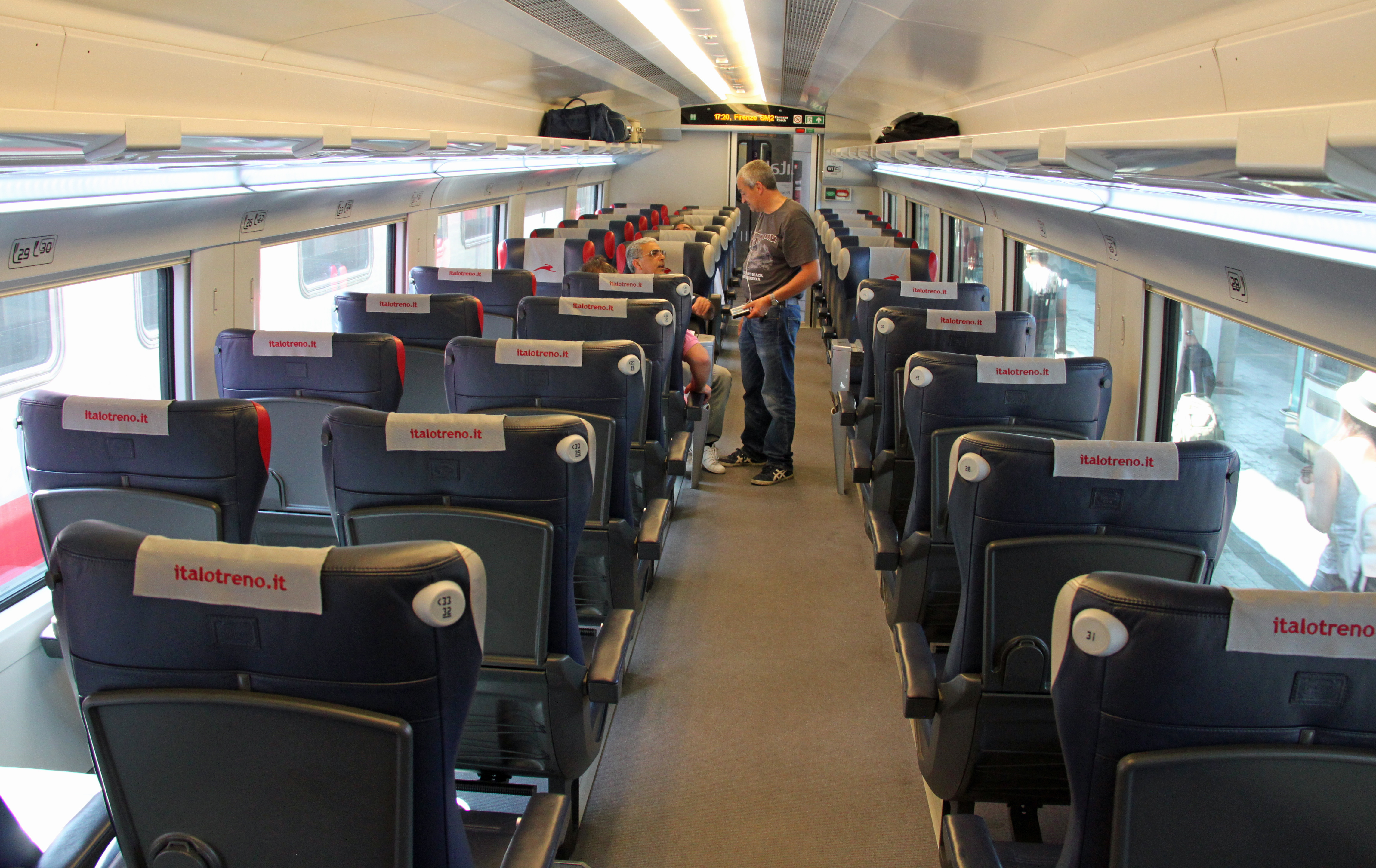 Interieur van de .Italo van NTV, de particuliere hogesnelheidstrein in Italië.